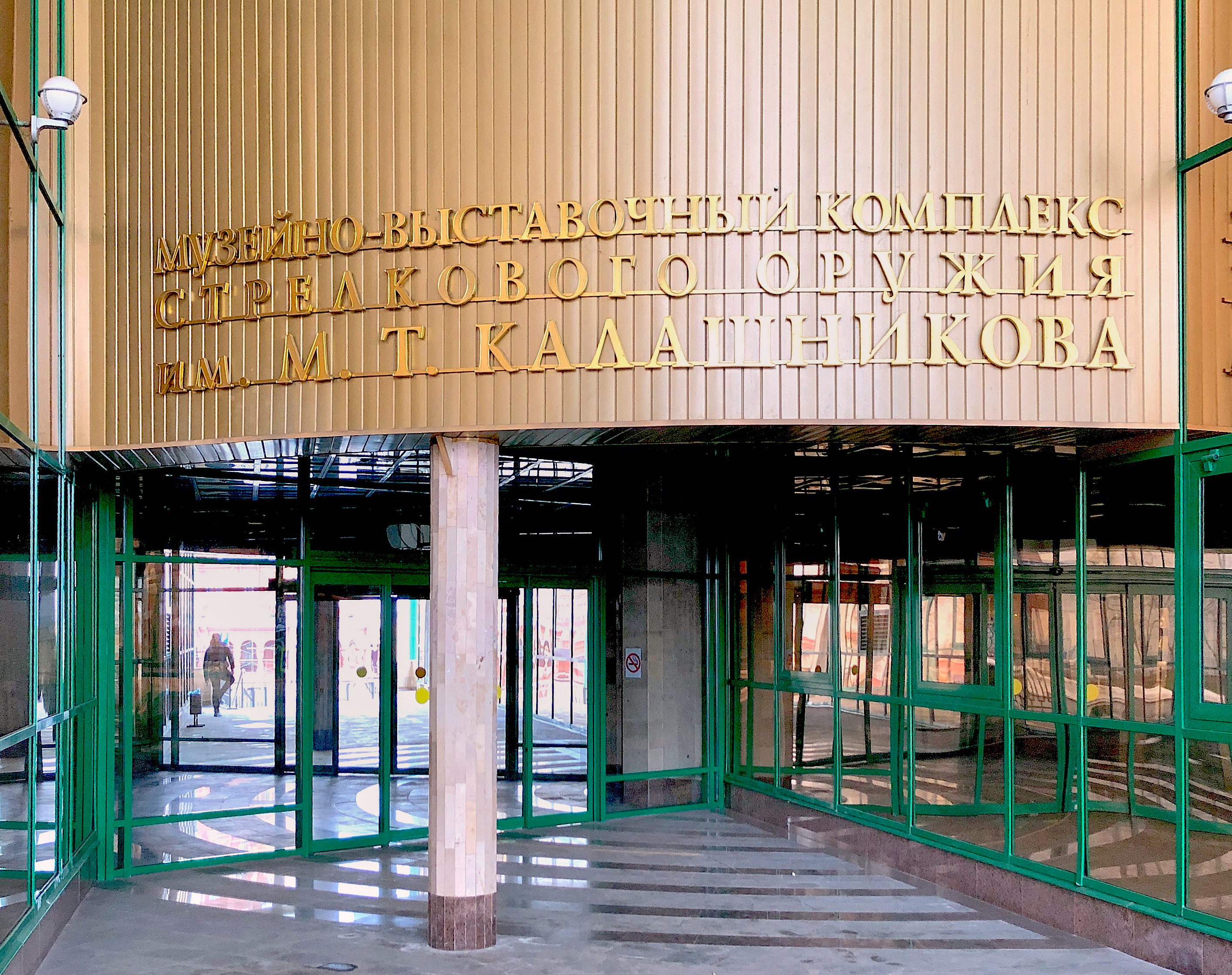 Музейно-выставочный комплекс стрелкового оружия имени М. Т. Калашникова в Ижевске - главный вход